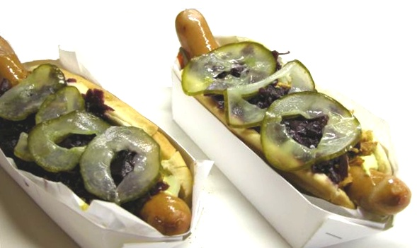 Faroese hotdogs